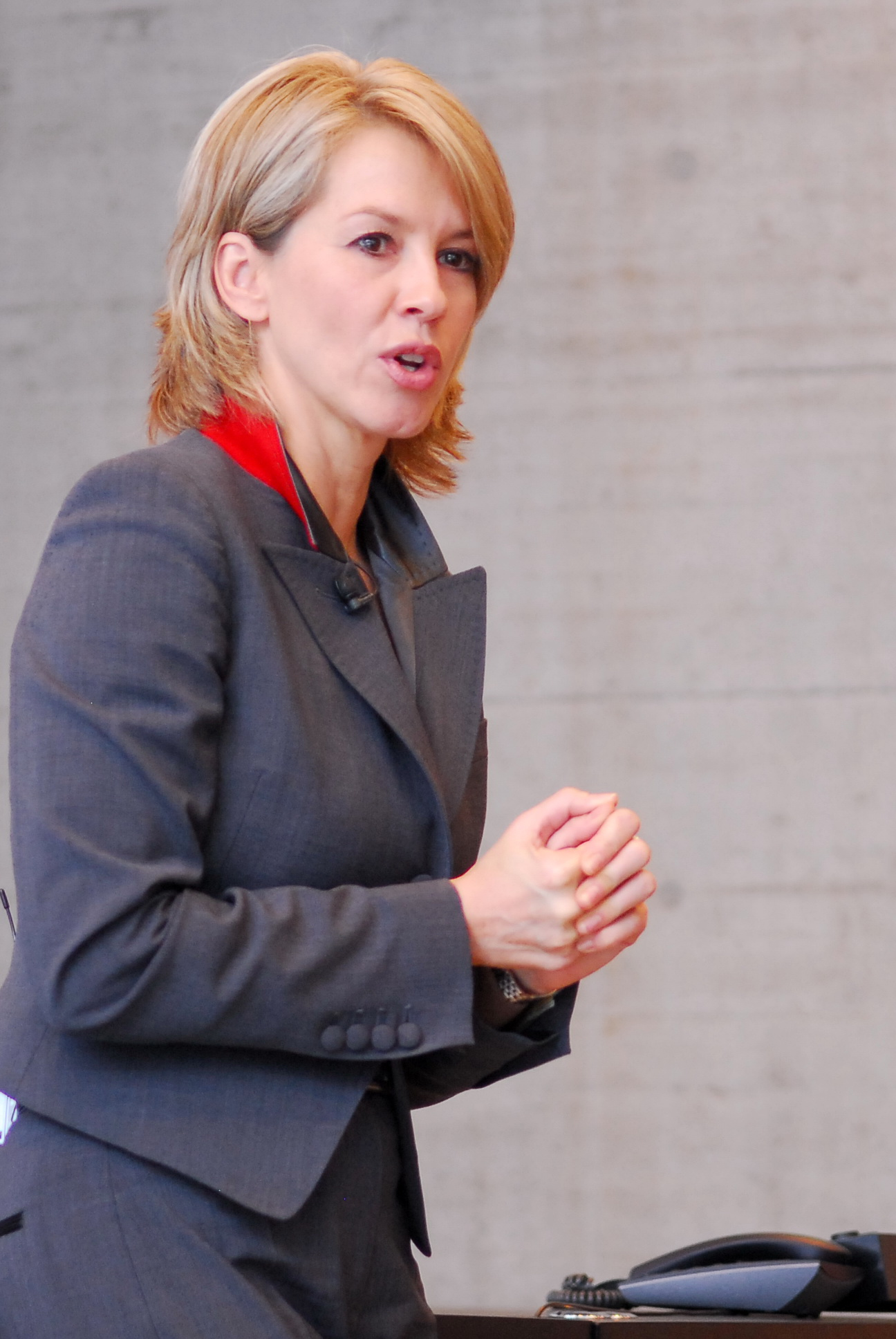 Christine Maier bei einem Auftritt als Moderatorin